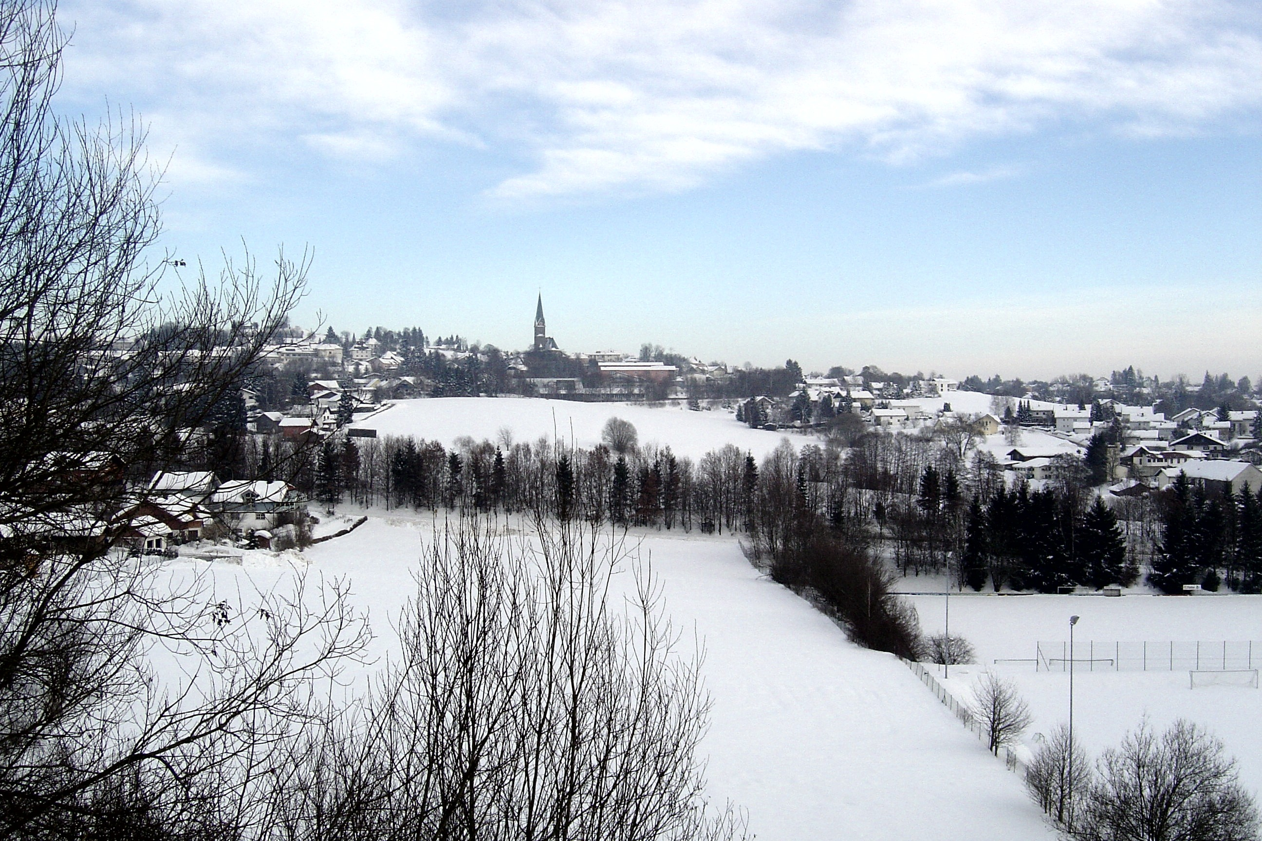 Beschreibung: Blick vom Steinbruch auf Tittling Quelle: Bild selbst erstellt Datum: 28. Januar 2006 Autor: Dennis Hansl